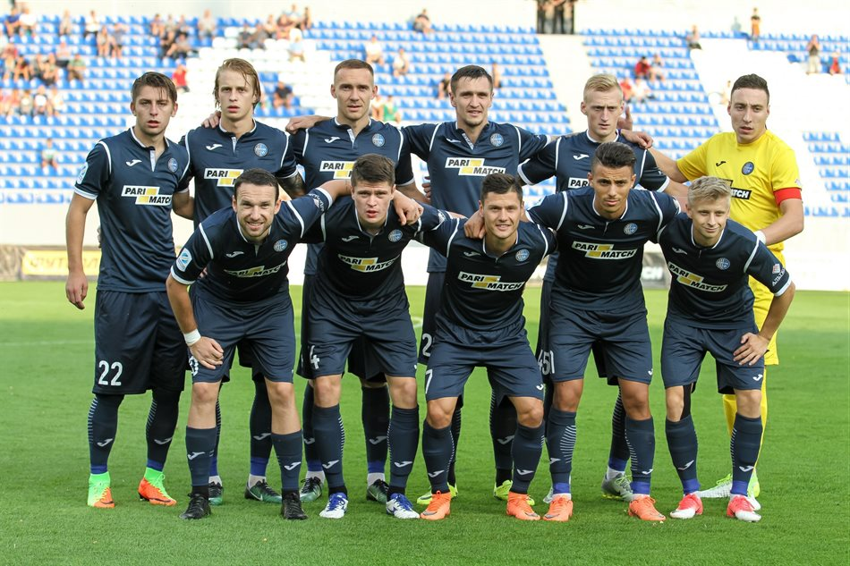 Олімпік (Донецьк) перед історичним дебютним матчем у єврокубках проти ПАОКа